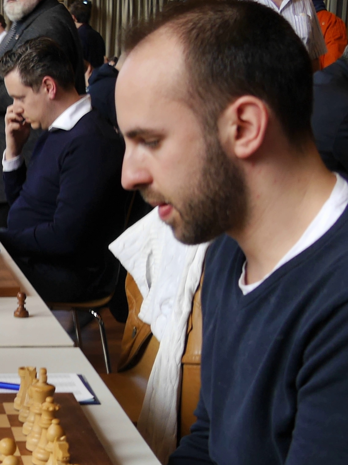 Lawrence Trent, Runde 5 Grenke Chess Open 2018 in Karlsruhe.